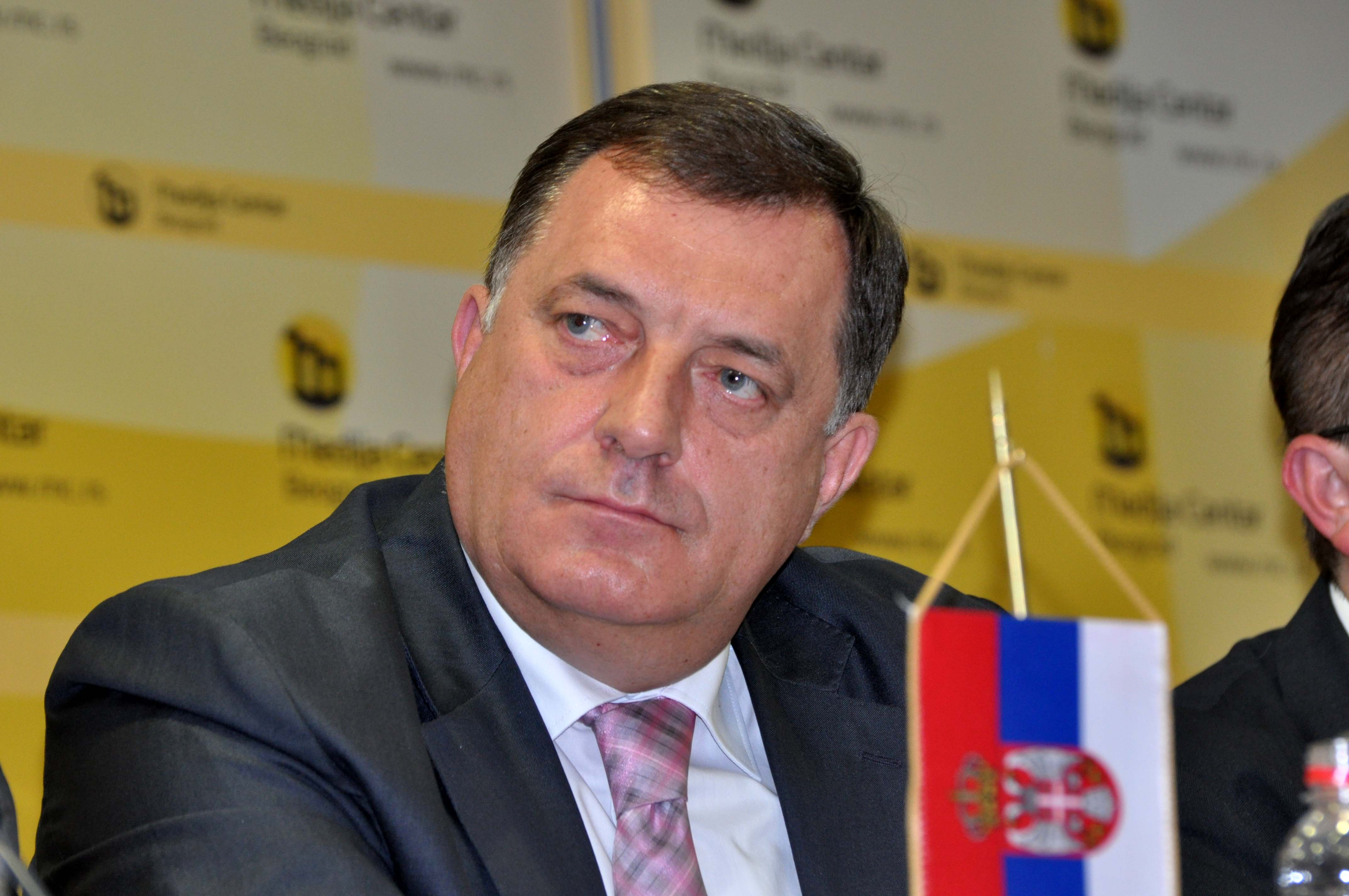 Милорад Додик 2016